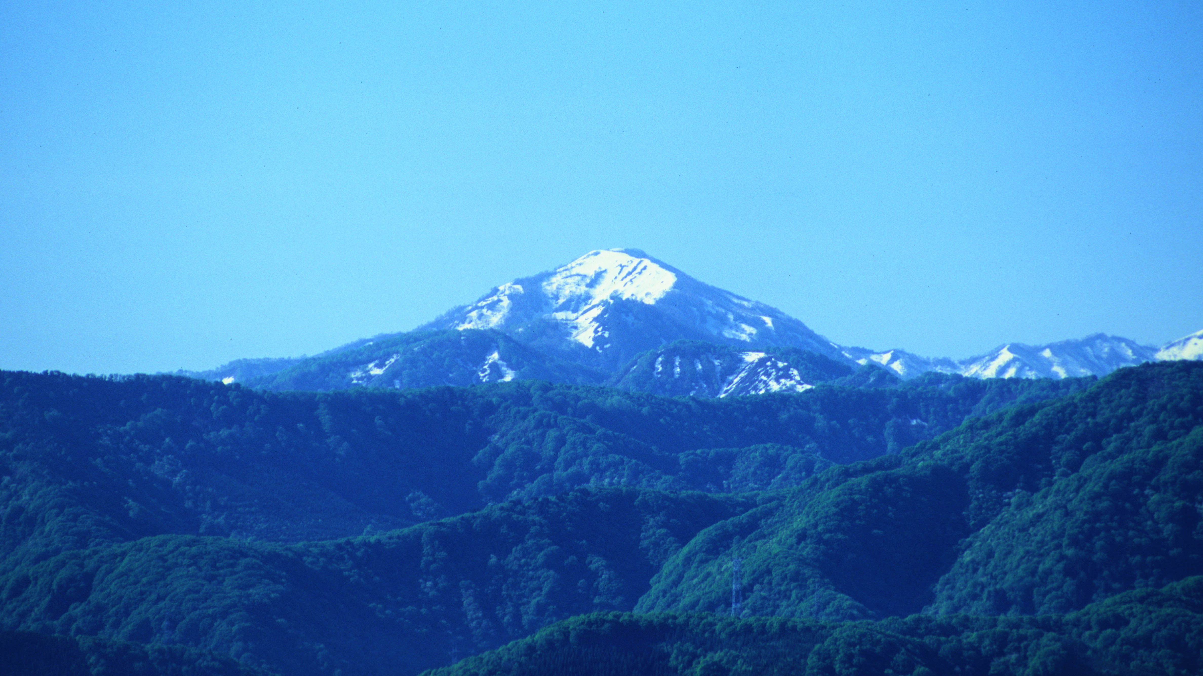 残雪の大門山。金沢市キゴ山より